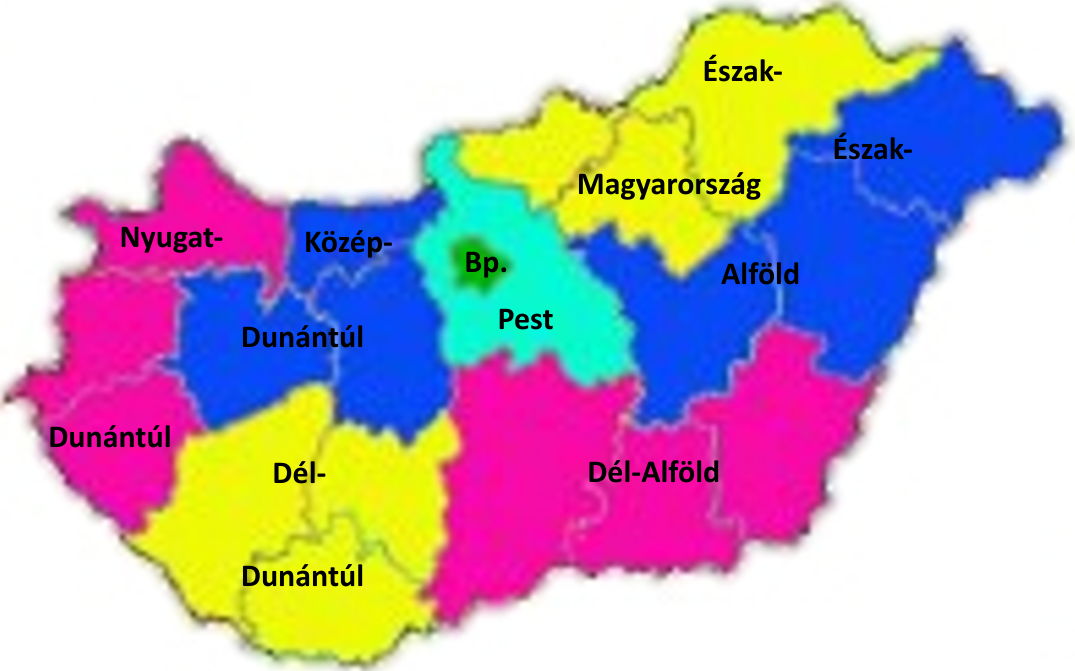 A fényképen a Közép-Magyarország NUTS 1 régió 2018-as Budapest főváros és Pest megye NUTS 2 régiókra bontása utáni nyolc NUTS 2 régió látható, a megyehatárokkal együtt.